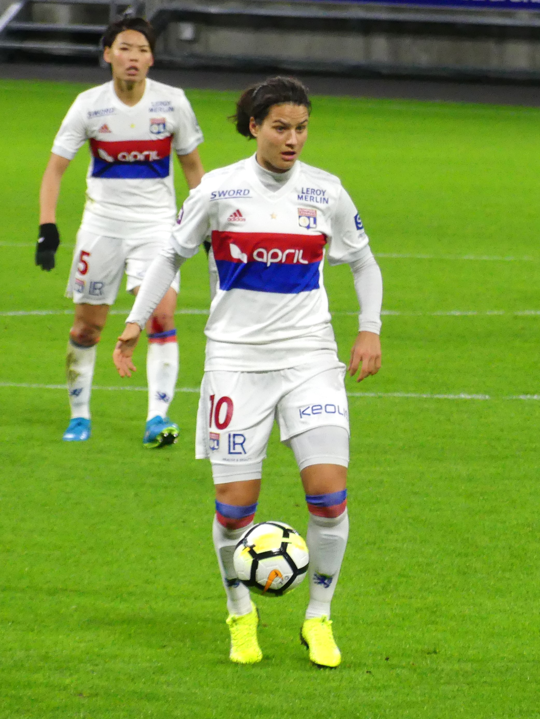 Dzsenifer Marozsán lors du match de l'Olympique lyonnais face au Paris Saint-Germain en championnat le 11 décembre 2017.